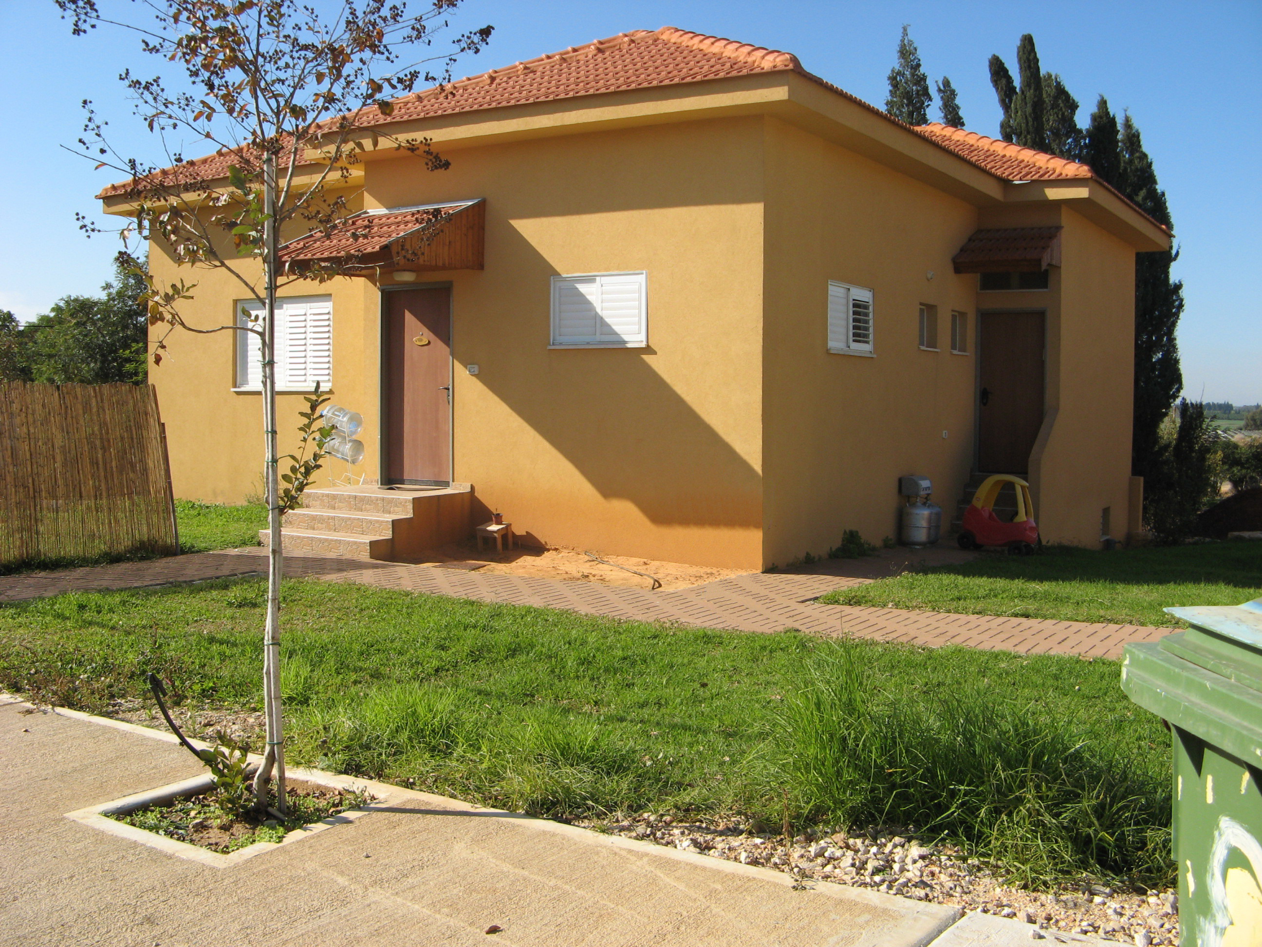 בית בכפר פינס(לשעבר, בית הרב)